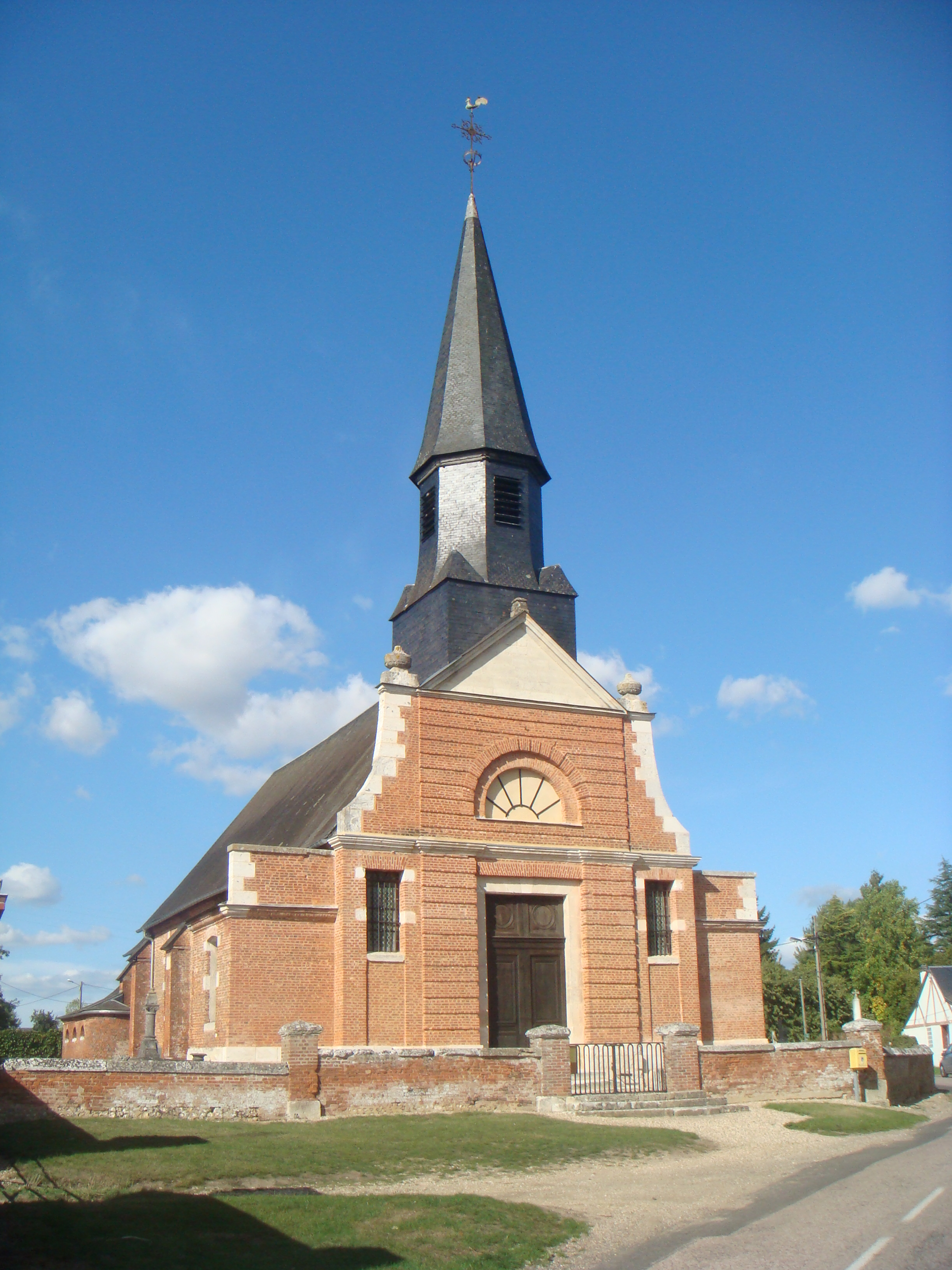 L'église de Villettes dans l'Eure